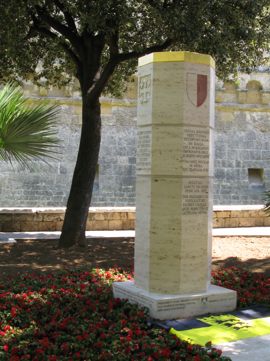 Bari - Stauferstele in der Grünanlage der Giardini Isabella d'Aragona auf der Westseite des Castello Svevo